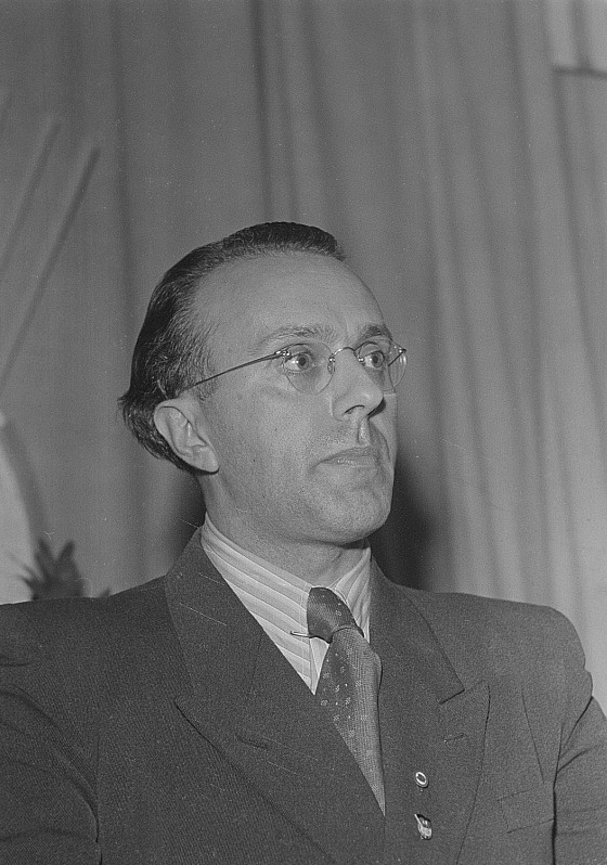 Original image description from the Deutsche FotothekPorträt des neuen Oberbürgermeisters Erich Uhlich